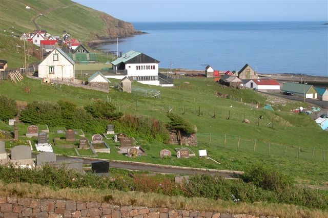 Hov, Suðuroy